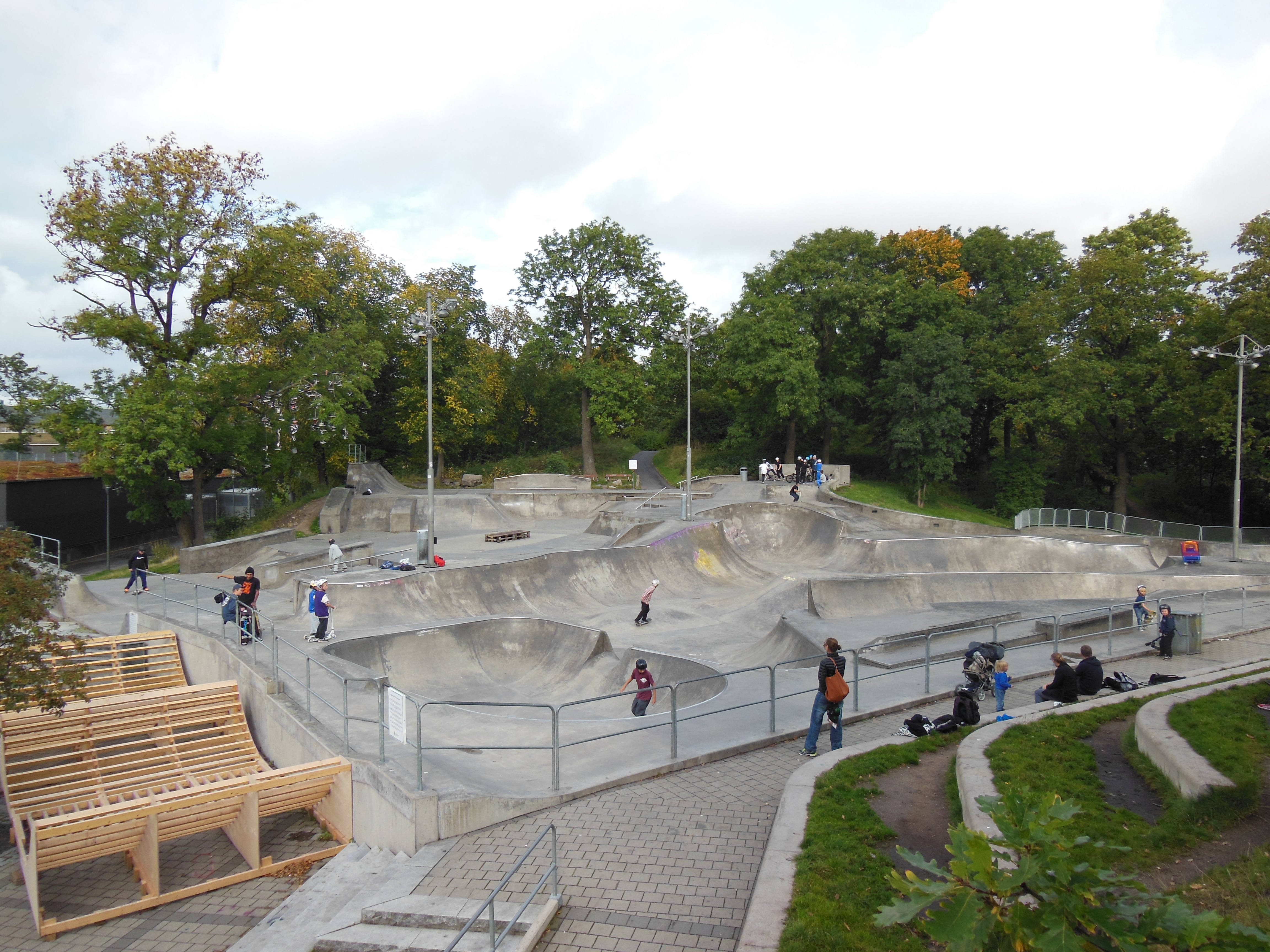 Actionparken bakom Bergakungen, Göteborg.